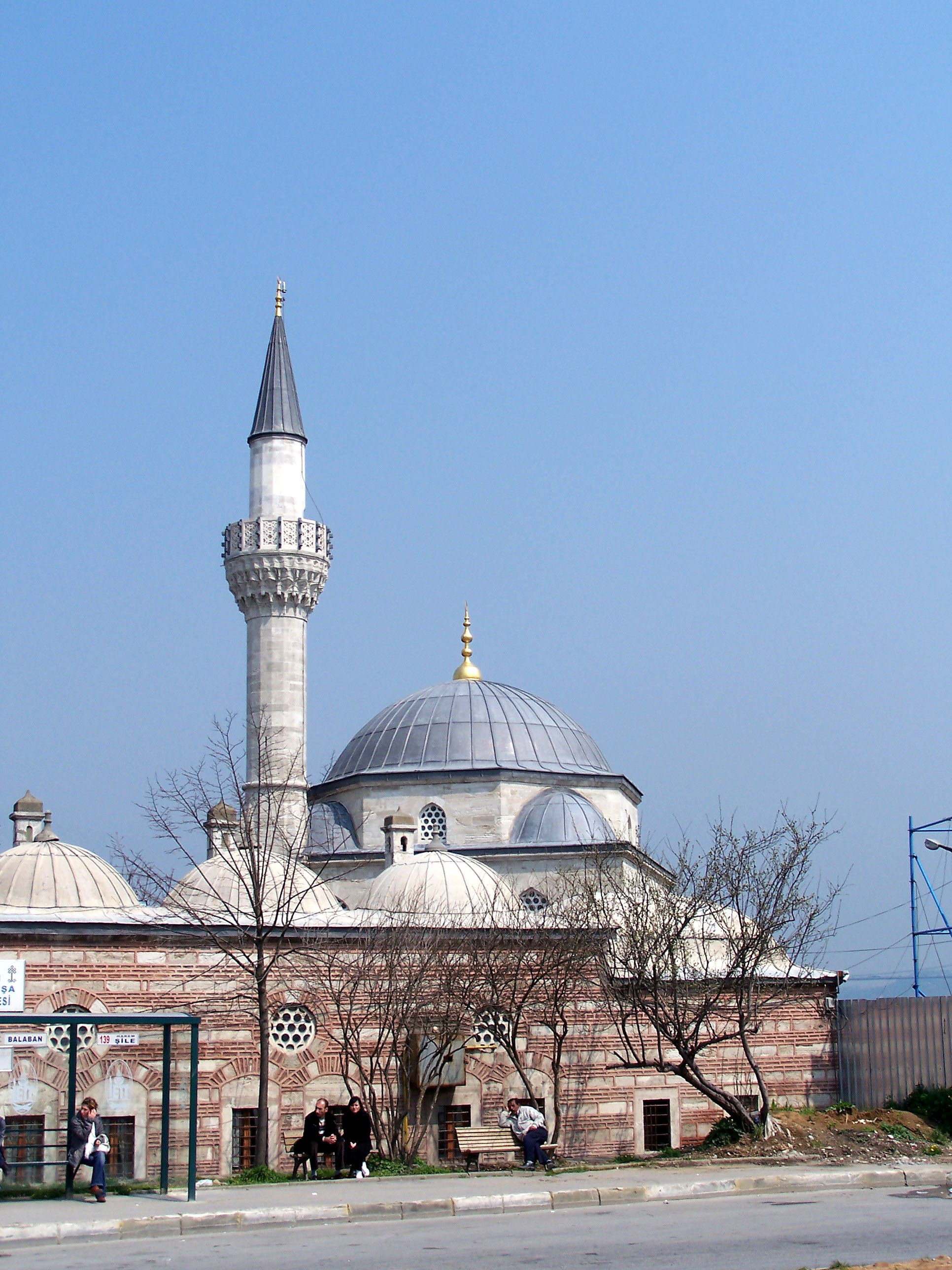 Şemsi Paşa Camii (mosque) in Üsküdar, Istanbul, Turkey.